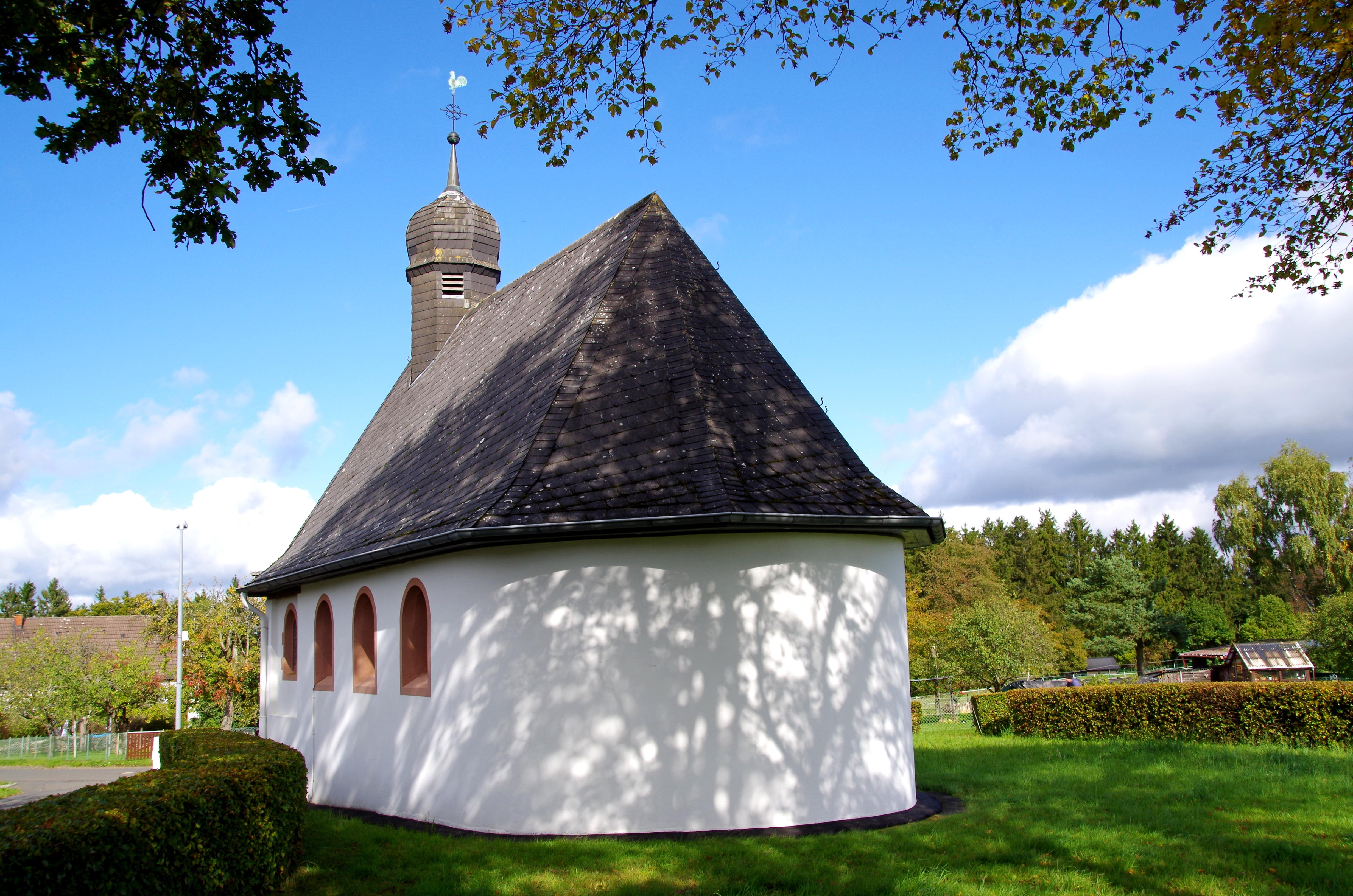 Maria-Hilf-Kapelle Kerperscheid, Südansicht mit Heckenanlage